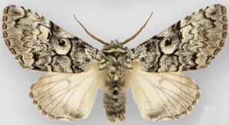 Charadra deridens male